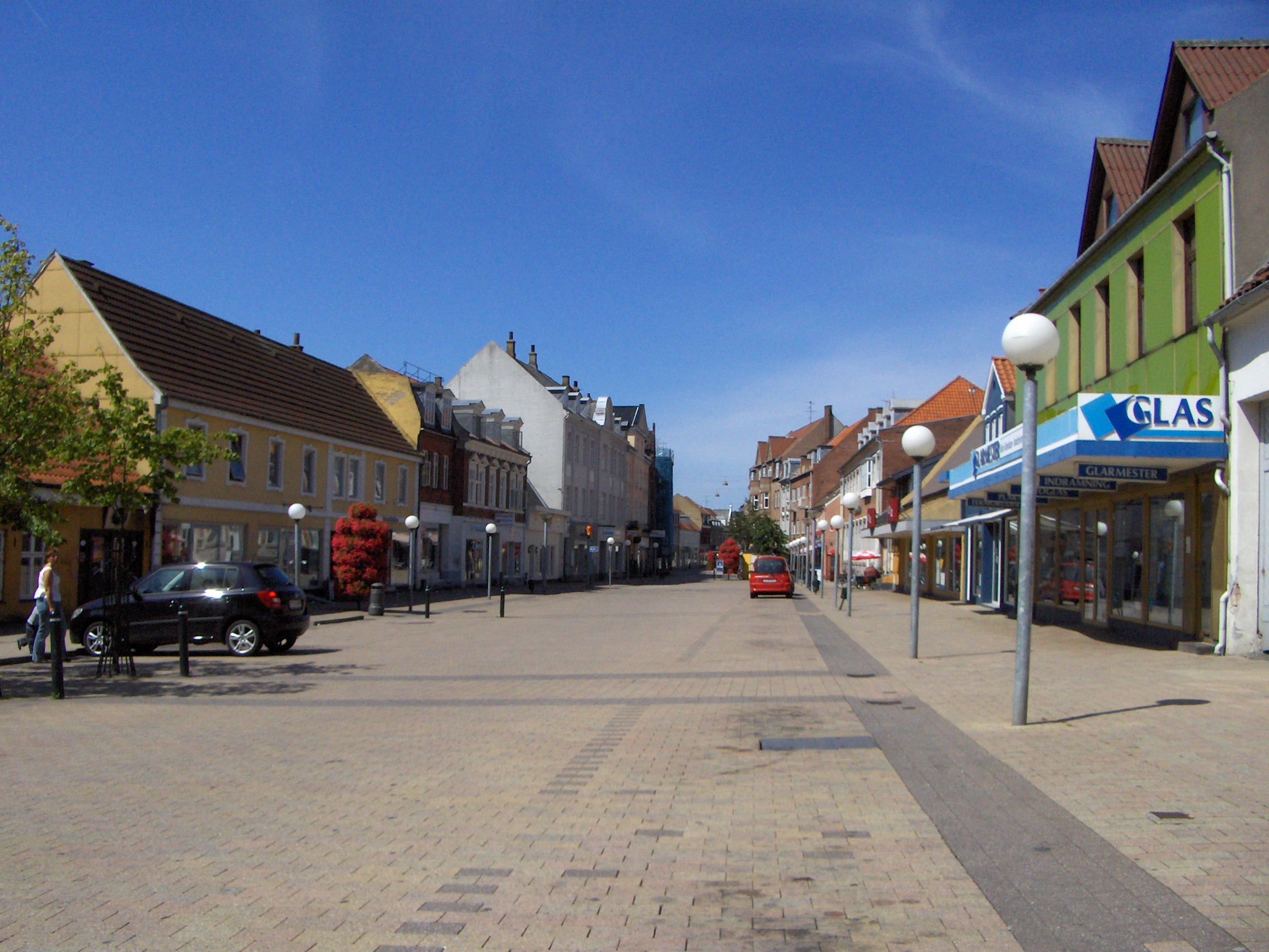 Kordilgade i Kalundborg set fra øst